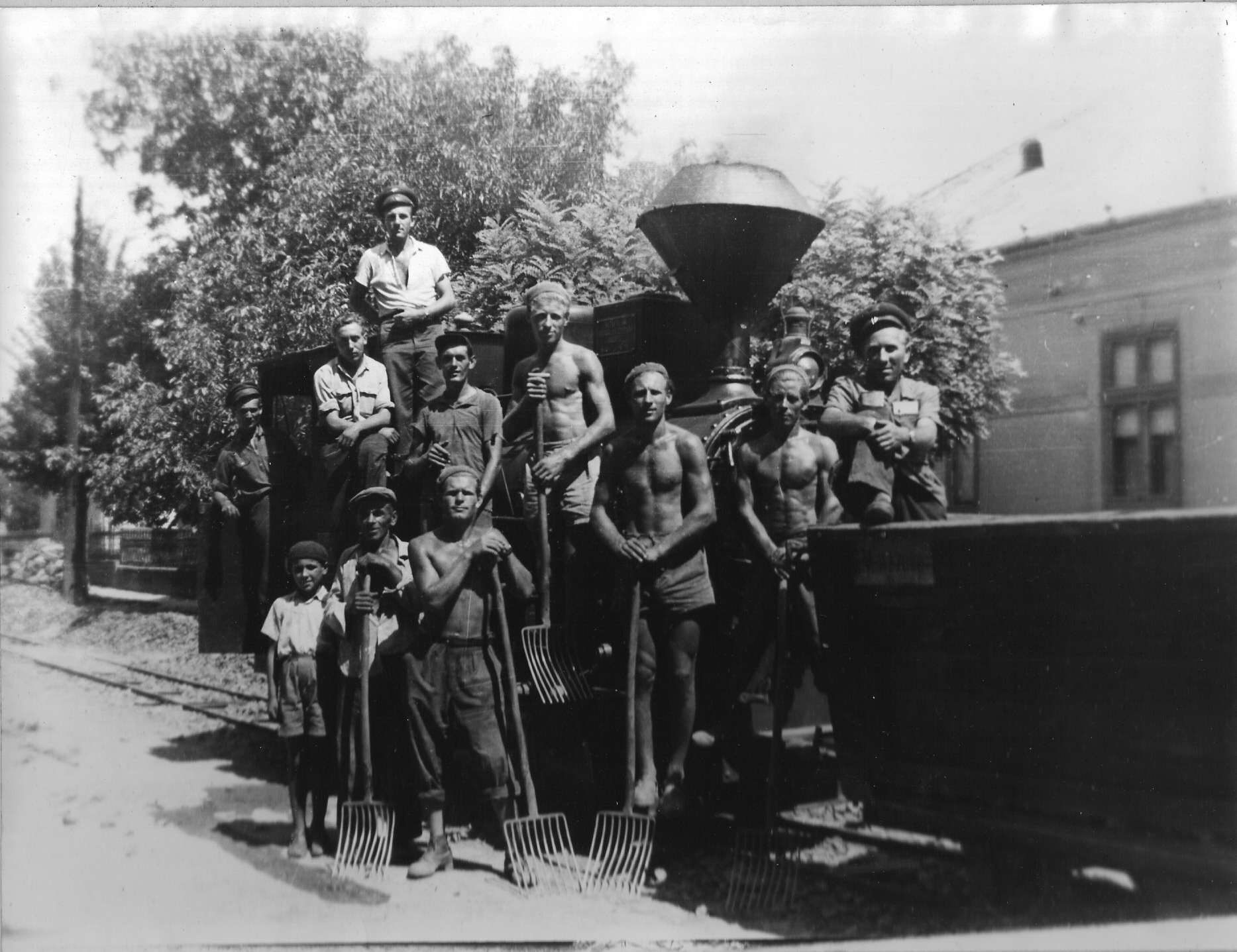 A 67-es főút építése a Kossuth Lajos utcában. Háttérben a Parókia épülete. A földmunkákhoz a mára már megszűnt Kaposvári Gazdasági Vasút kocsijait használták, végig lesinezve a főutcát.